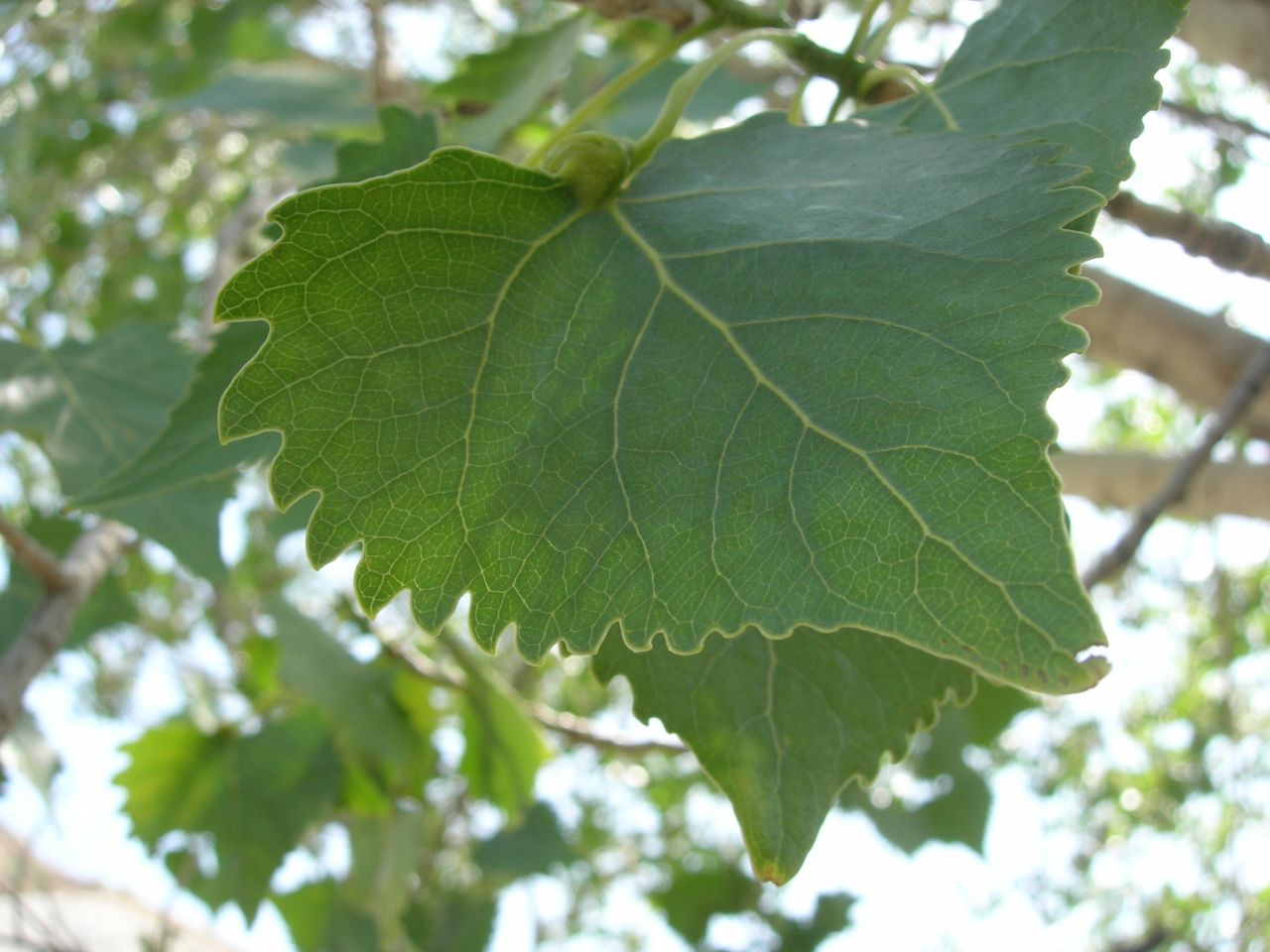 Populus fremontii ssp. fremontii — Fremont's cottonwood. In Nevada.